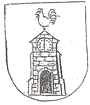 Herb Radoszyc z 1847 roku